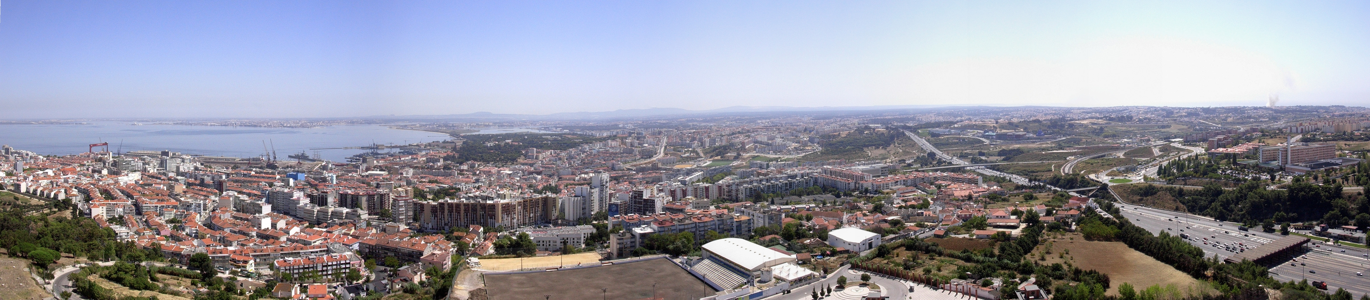 Almada, portugal, view from Cristo Rei